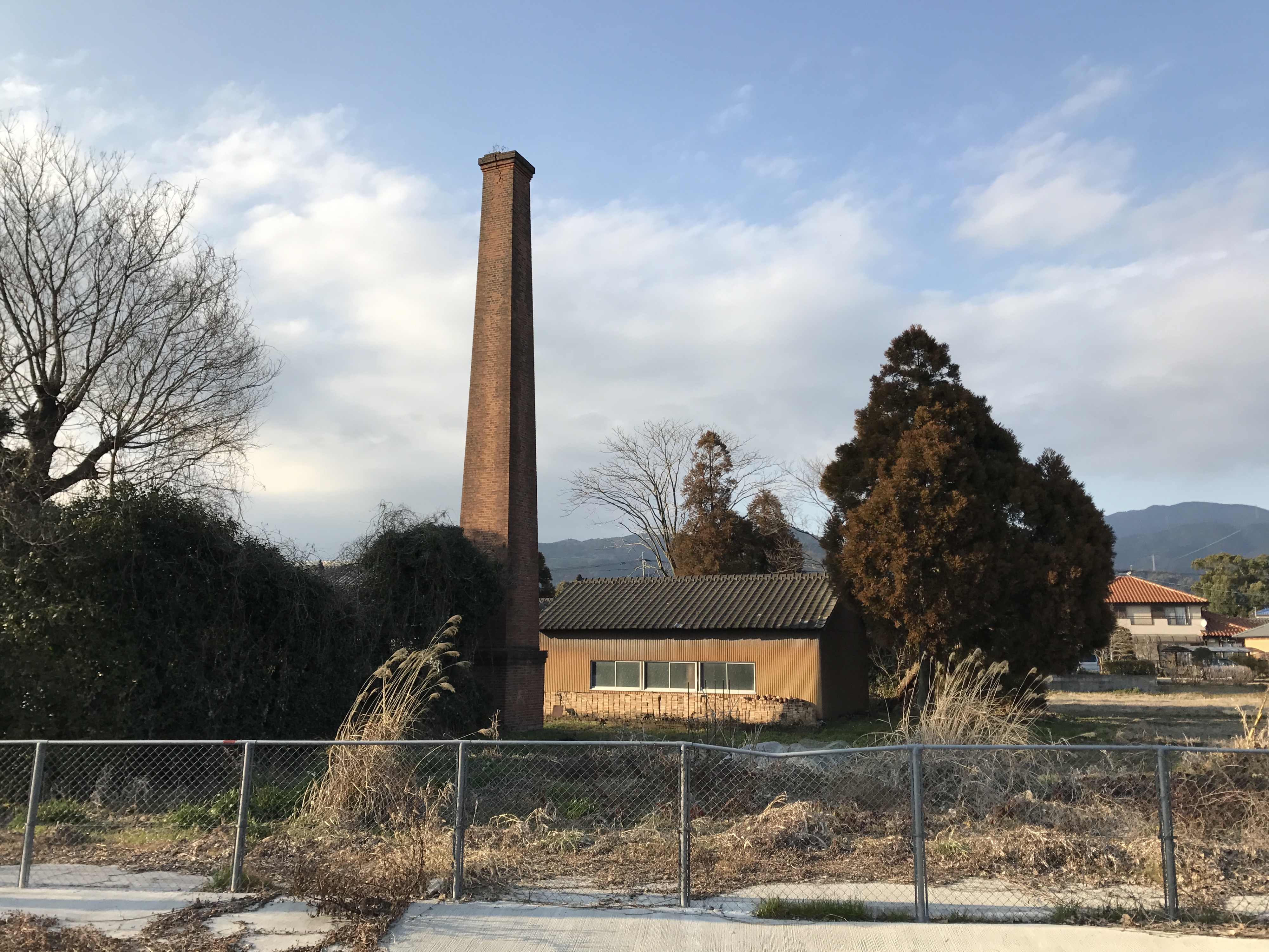 中原駅のホームより望む駅北側の煙突